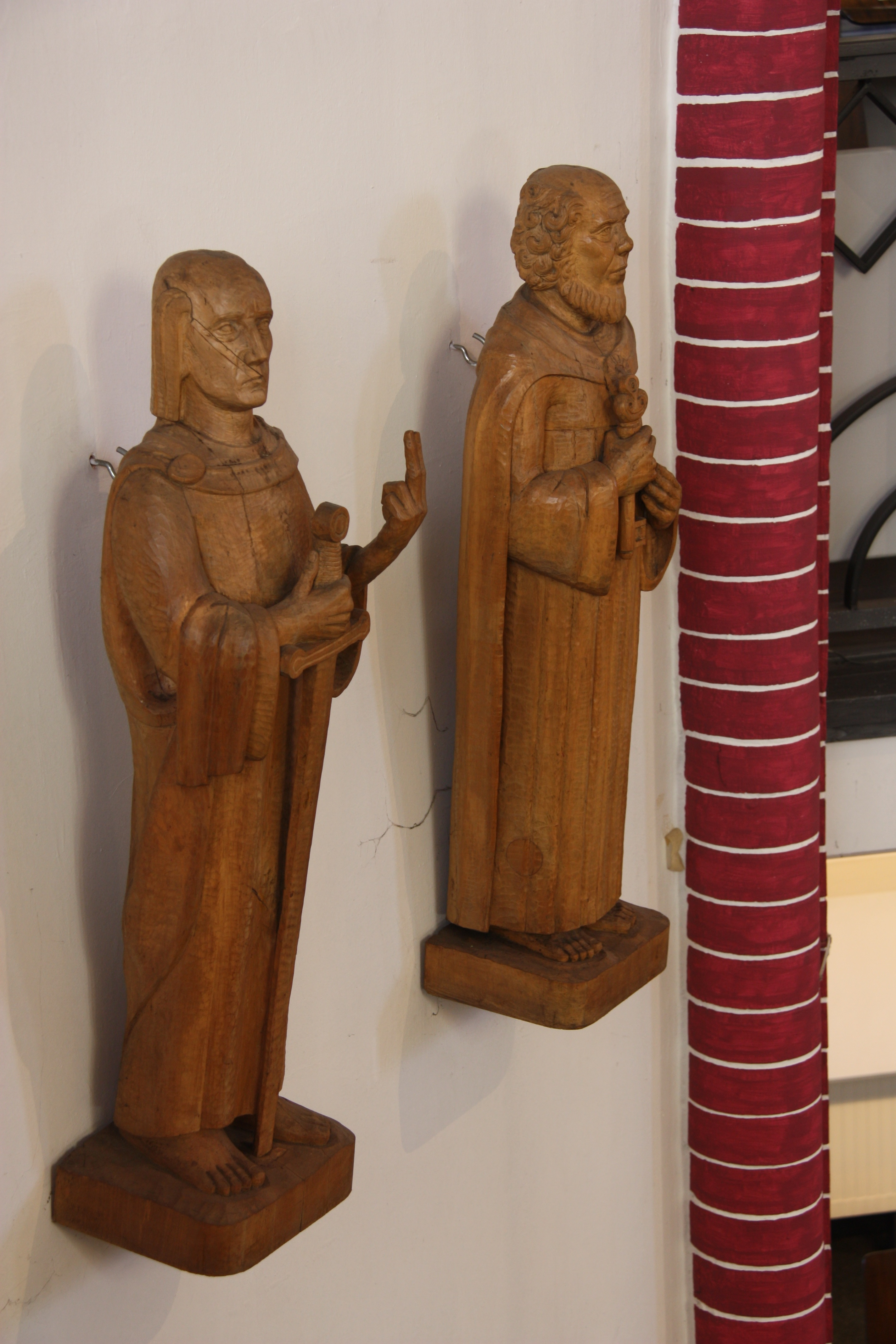 Hamburg, Ottensen, Kreuzkirche, Innenraum, 2 der 4 hölzernen Apostelfiguren